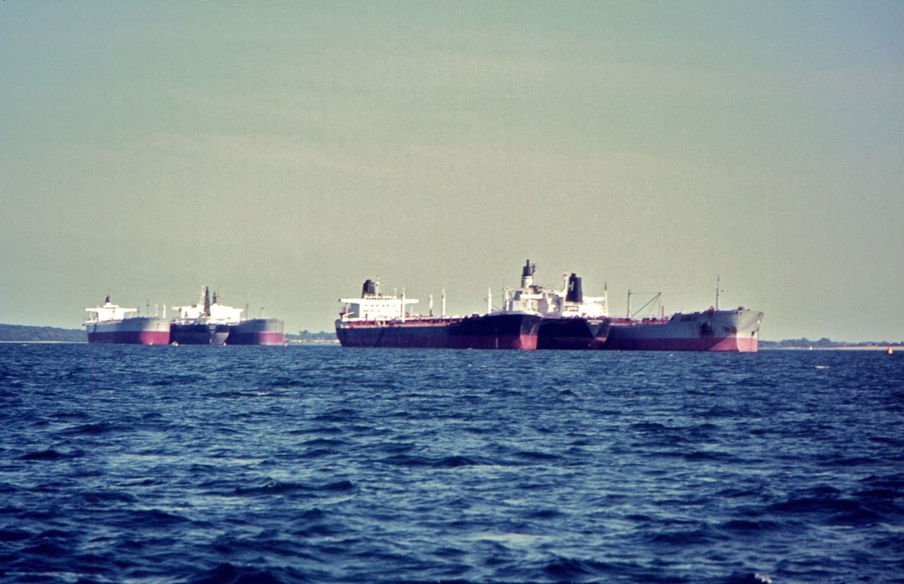 Geltinger Bucht 1976. Aufgrund der Auswirkungen der ersten Ölkrise liegen mehrere Supertanker als Auflieger in der Geltinger Bucht vor Anker.